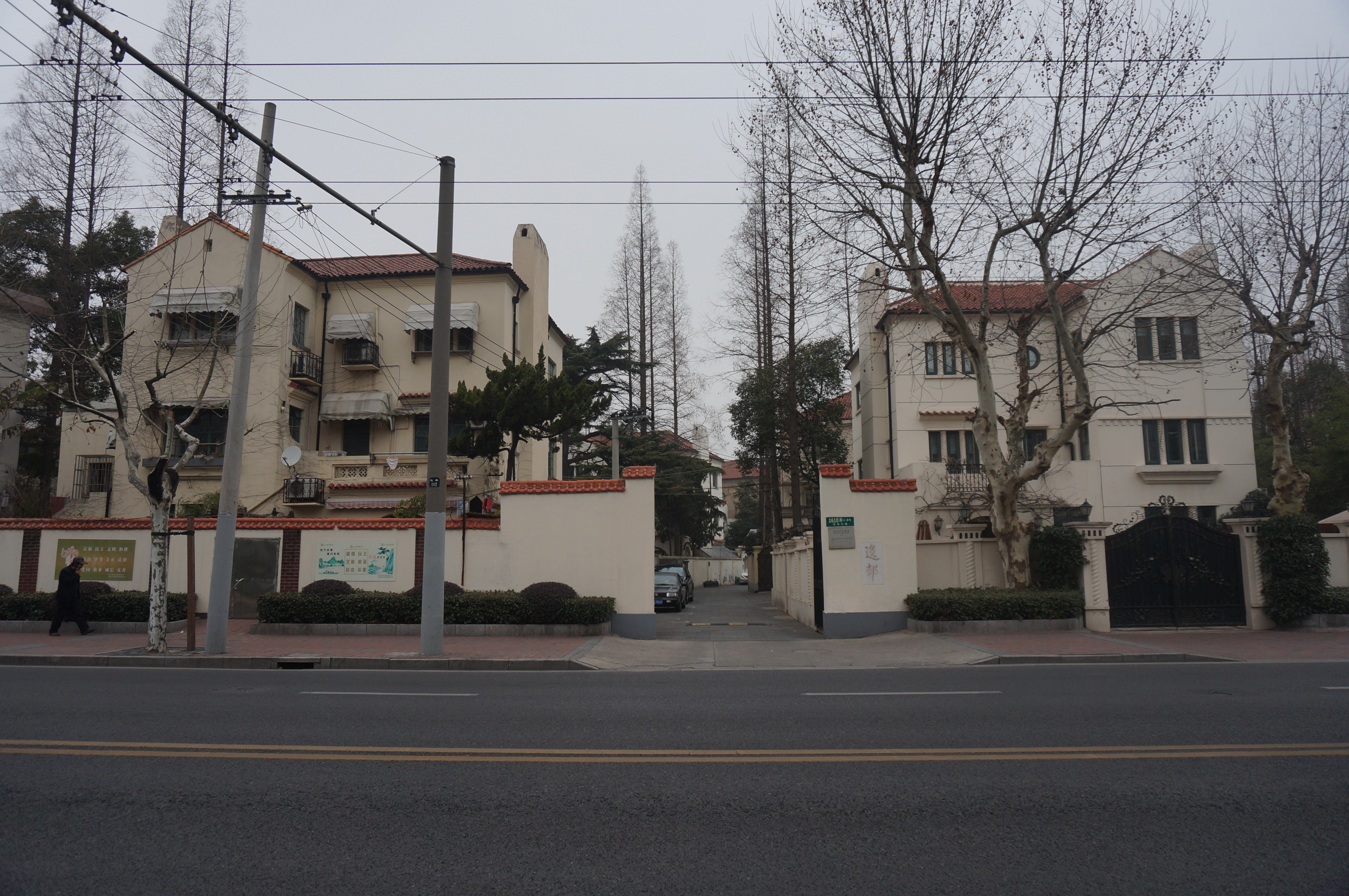 中文（中国大陆）: 蒋经国旧居——上海逸村